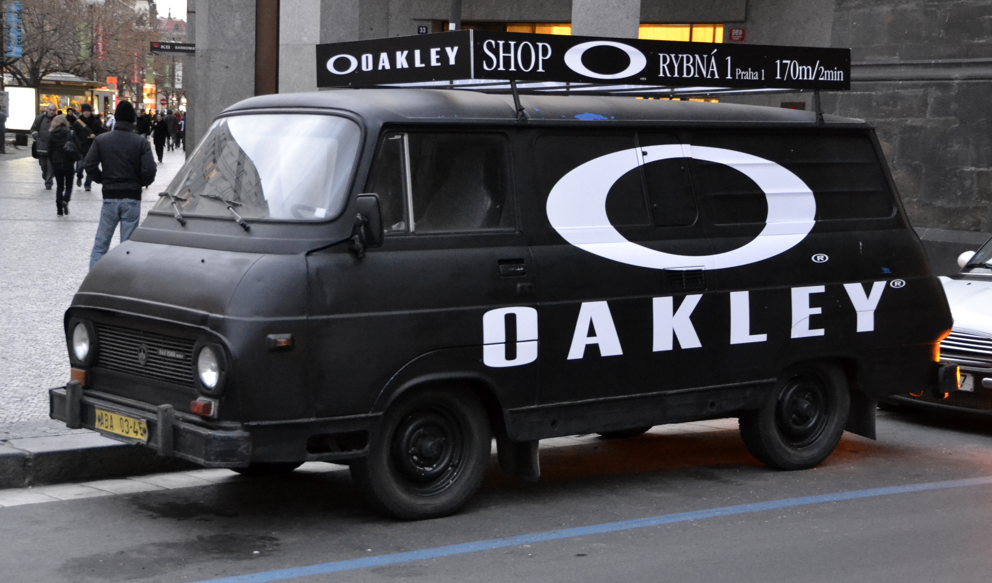 A Skoda van in Prague. Note the Oakley advertisement printed on it.